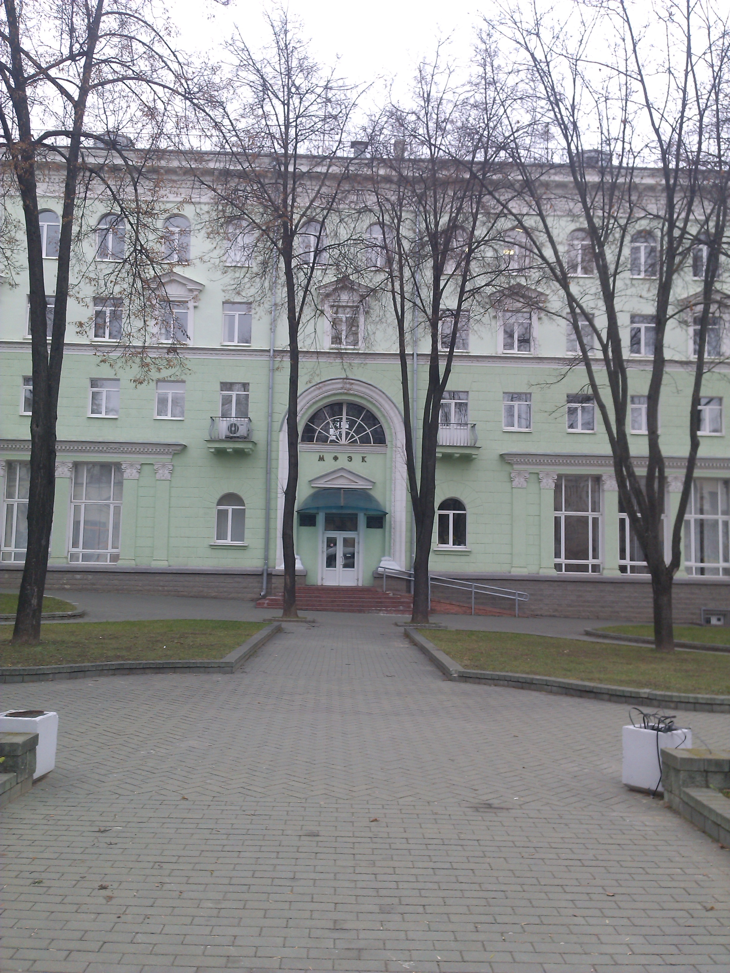 Минский финансово-экономический колледж. Наши дни.